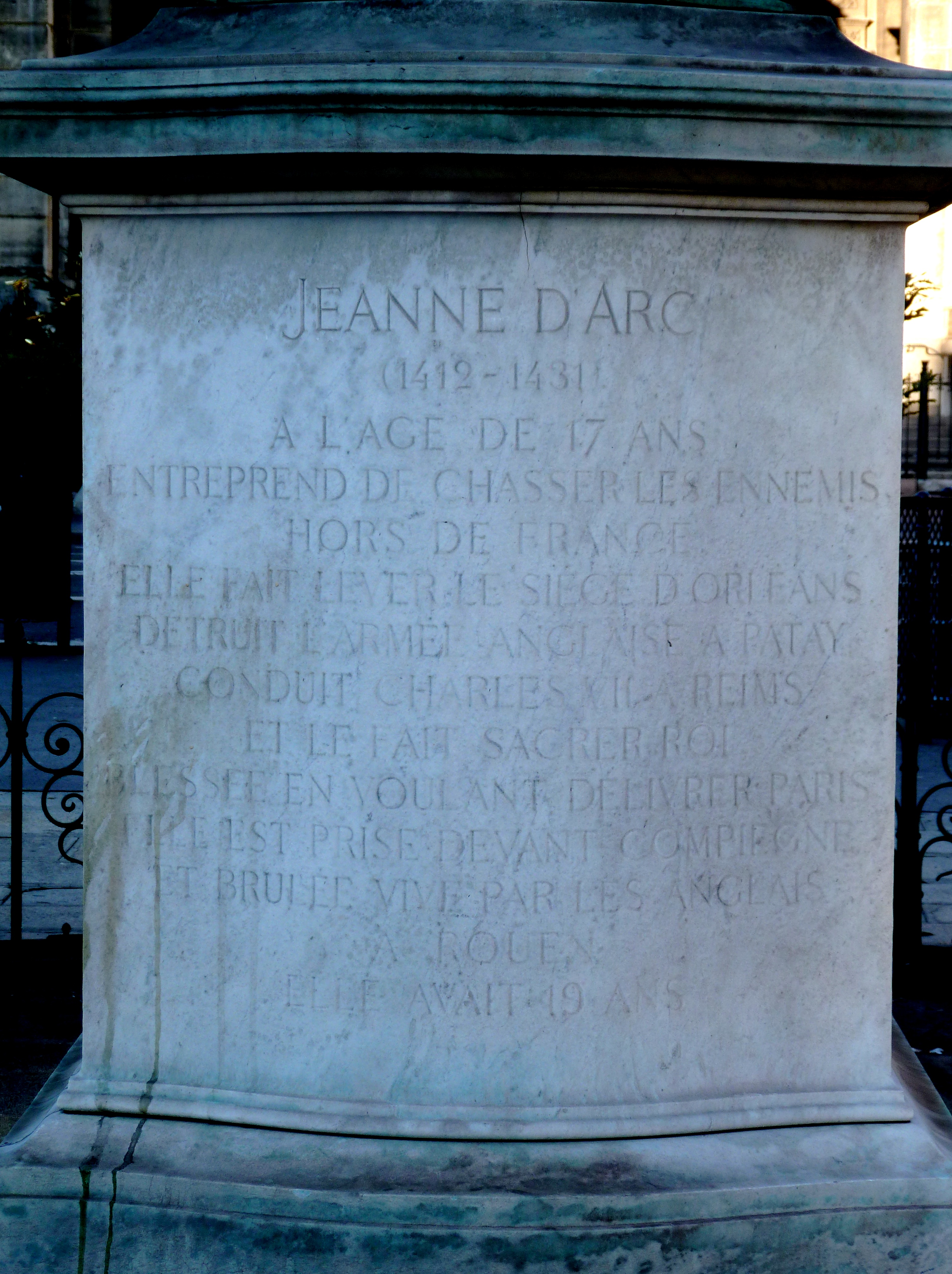 Statue équestre de Jeanne d'Arc (érigée en 1896), par Paul Dubois (1829-1905) sur la place Saint-Augustin à Paris (8e arrond.) - Inscription sur le socle (des statues similaires existent à Reims, Strasbourg et Washington).